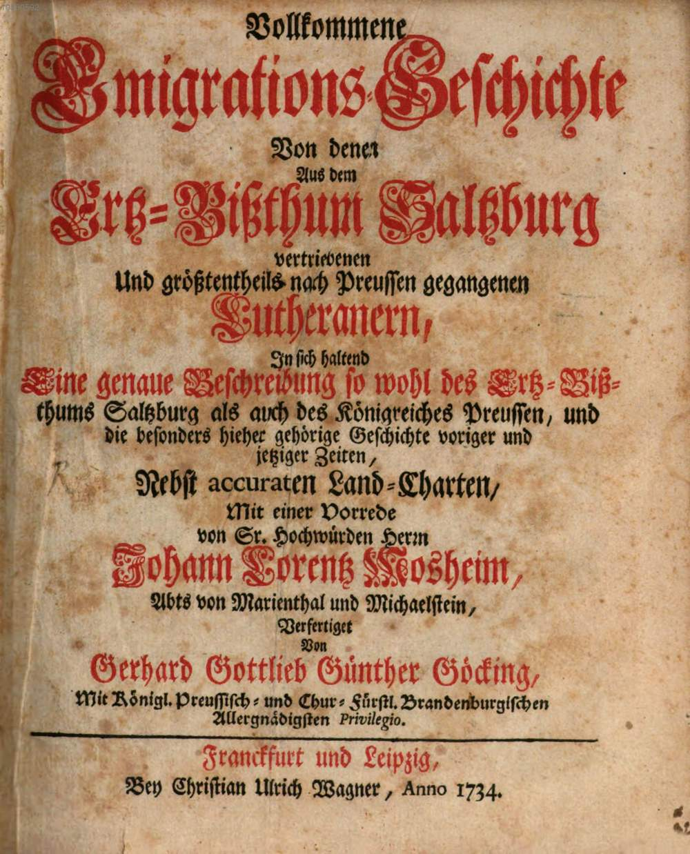 Gerhard Gottlieb Günther Göcking: Vollkommene Emigrations-Geschichte von denen aus dem Ertz-Bißthum Saltzburg vertriebenen und größtentheils nach Preussen gegangenen Lutheranern, in sich haltend eine genaue Beschreibung so wohl des Ertz-Bißthums Saltzburg als auch des Königreiches Preussen und die besonders hieher gehörige Geschichte voriger und jetziger Zeiten. Nebst accuraten Land-Charten. Mit einer Vorrede von Sr. Hochwürden Herrn Johann Lorentz Mosheim, Abts von Marienthal und Michaelstein. Mit Königl. Preussisch- und Chur-Fürstl. Brandenburgischen allergnädigesten Privilegio. [1. Teil]. Verlag Christian Ulrich Wagner, Frankfurt / Leipzig 1734 - Titelblatt.